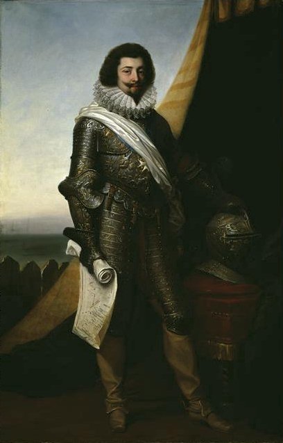 Copie d'un portrait du 17e siècle faisant partie du décor de la galerie du Château de Beauregard